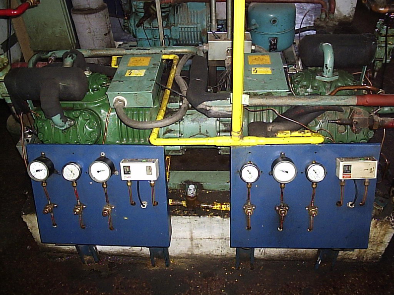 Compresor de doble etapa en tándem